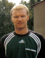 Tomasz Łapiński - piłkarz grający na pozycji obrońcy, reprezentant Polski (36 spotkań w latach 1992-1999).